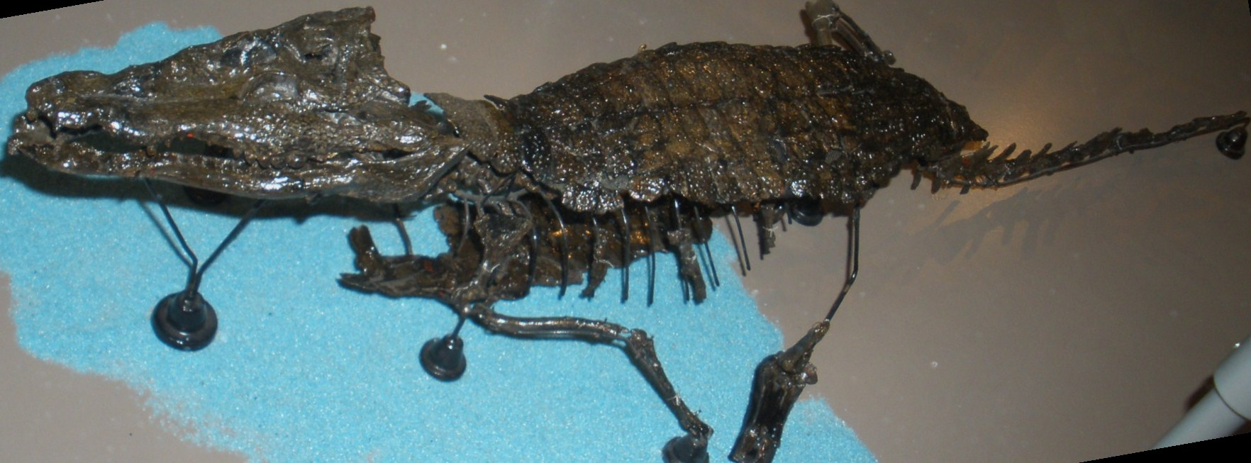 Holotype fossil of Bernissartia, an extinct crocodile Took the photo at Musee d'Histoire Naturelle, Brussels